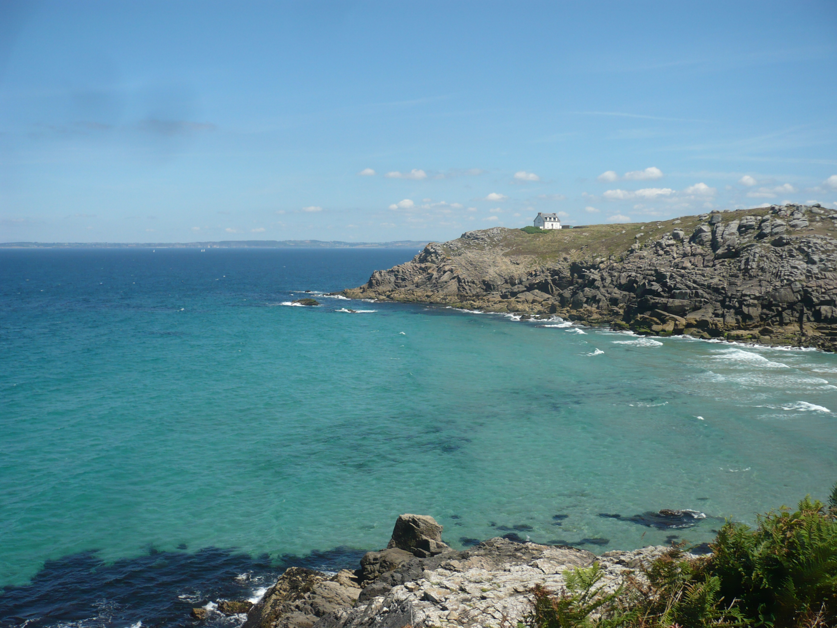 Pointe du Millier von Westen betrachtet